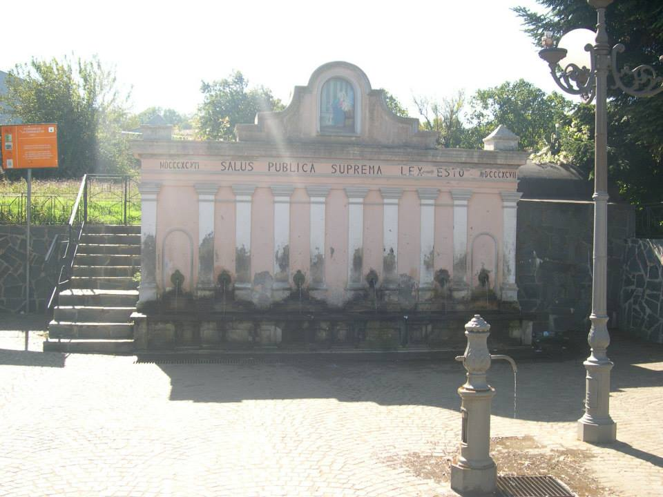 La Cannaletta: fontana a sei cannali recante la scritta "salus publica suprema lex esto".